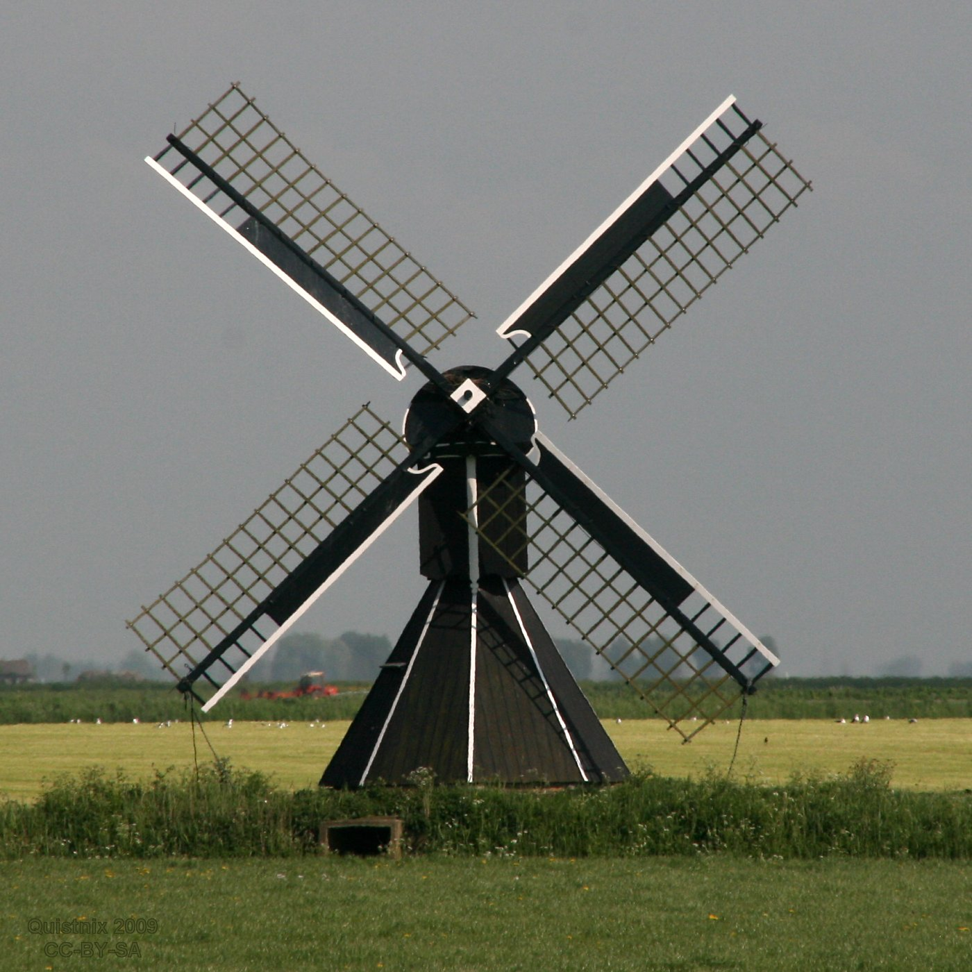 Tzum: Spinnenkop Teetlum